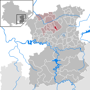 Quaschwitz in Thuringia - Saale-Orla-Kreis